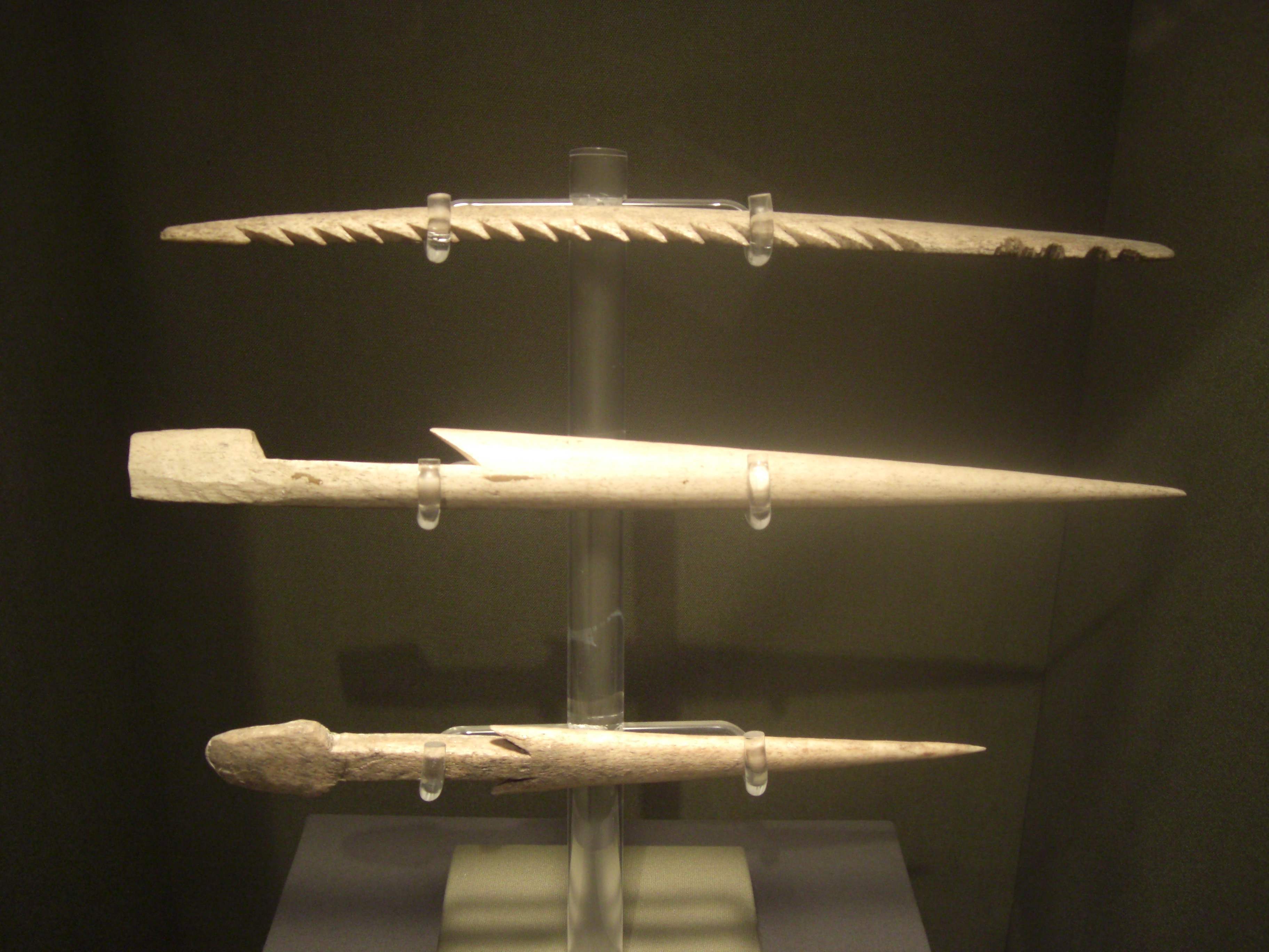 Puntas de arpón, Tierra del Fuego, Argentina. Cultura Yámaná o Yagán. Museo de la Plata